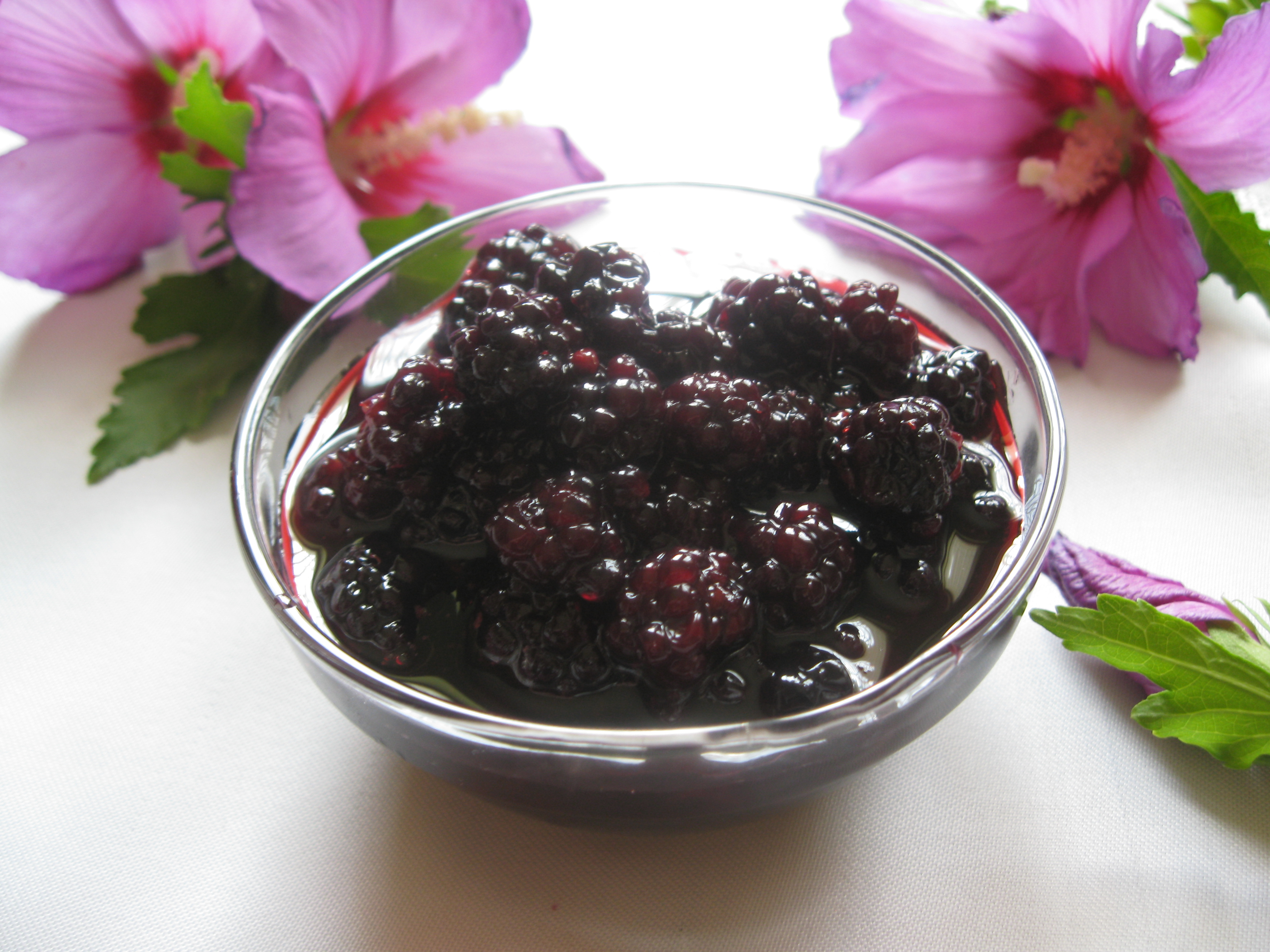 Reçel i njohur njohur nga kuzhina Shqiptare